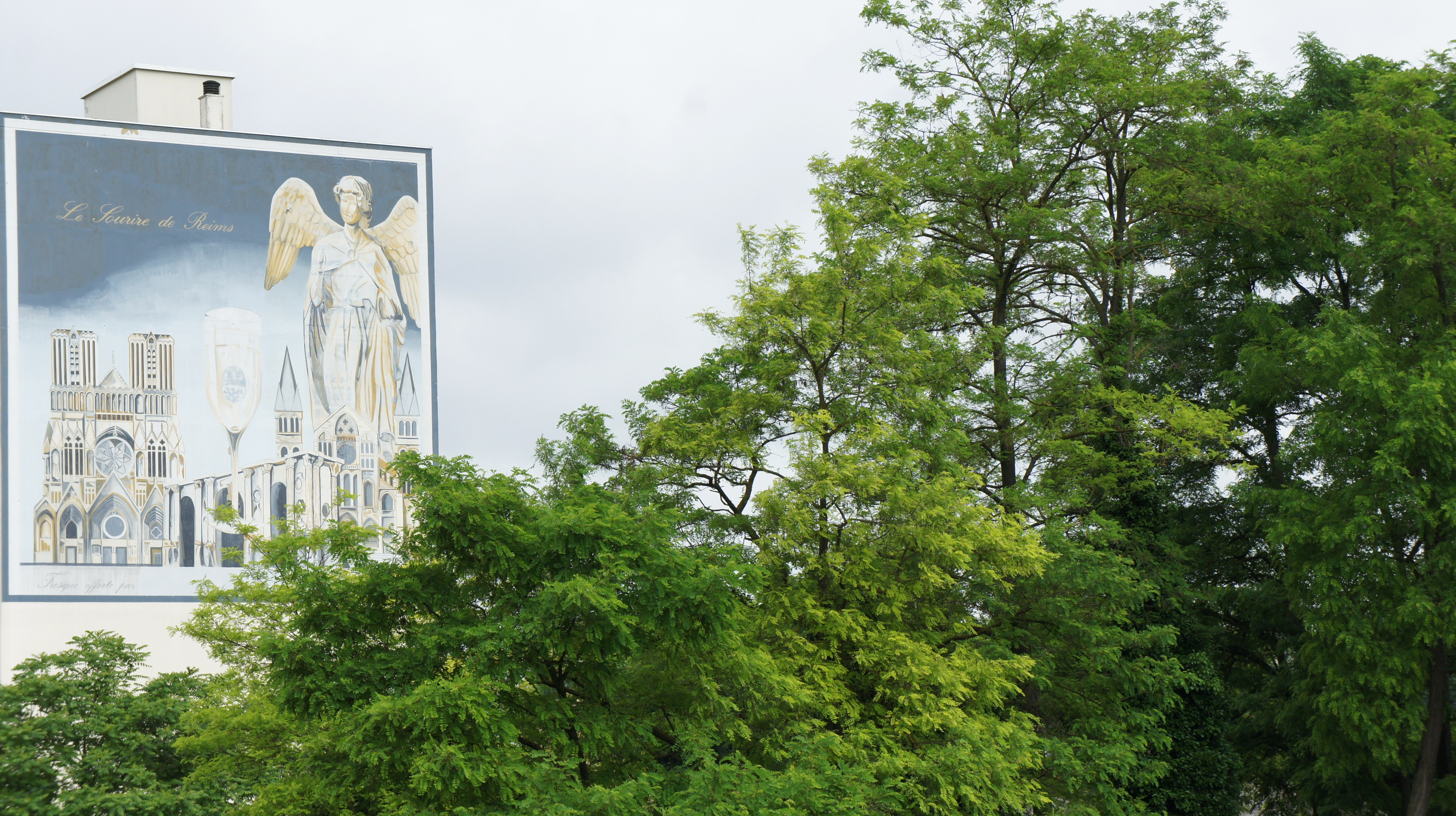 Publicité sur un immeuble de Reims, champagne le Sourire .